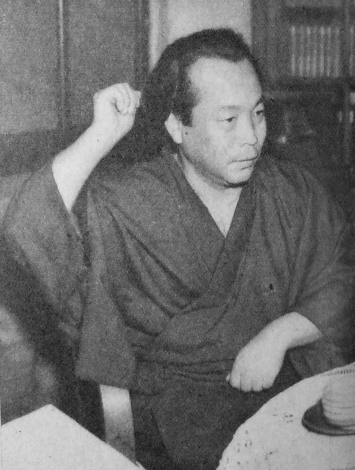 火野葦平